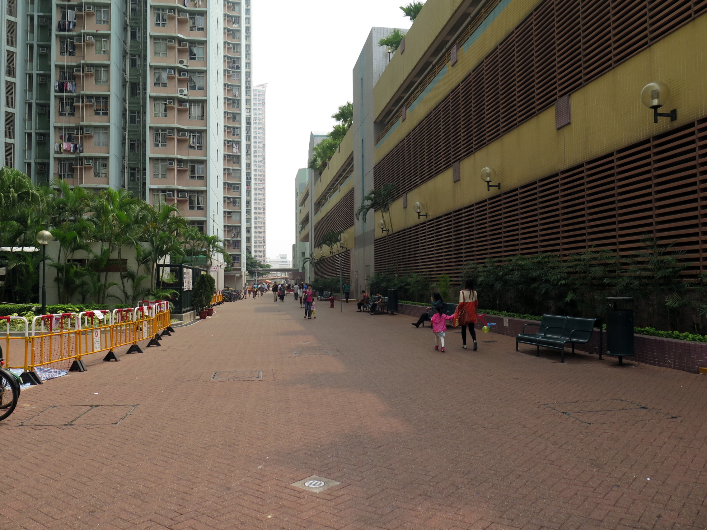 Tin Yuet Estate EVA